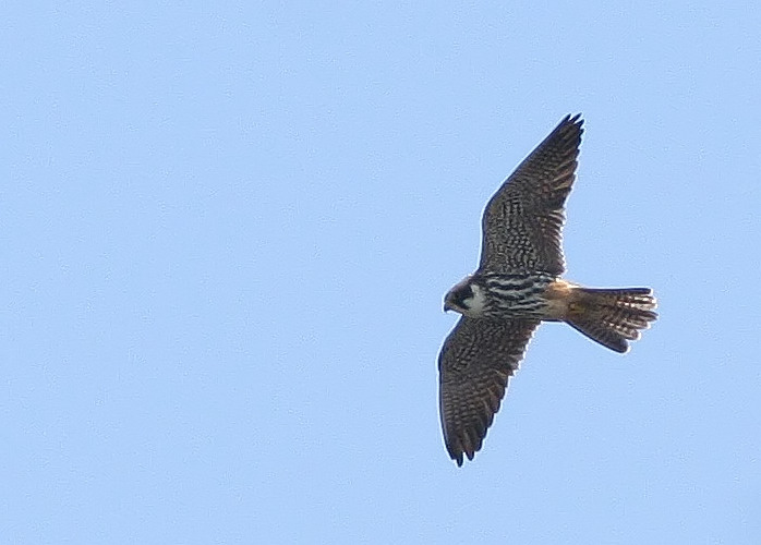 Falco subbuteo in Lasy Janowskie, Poland